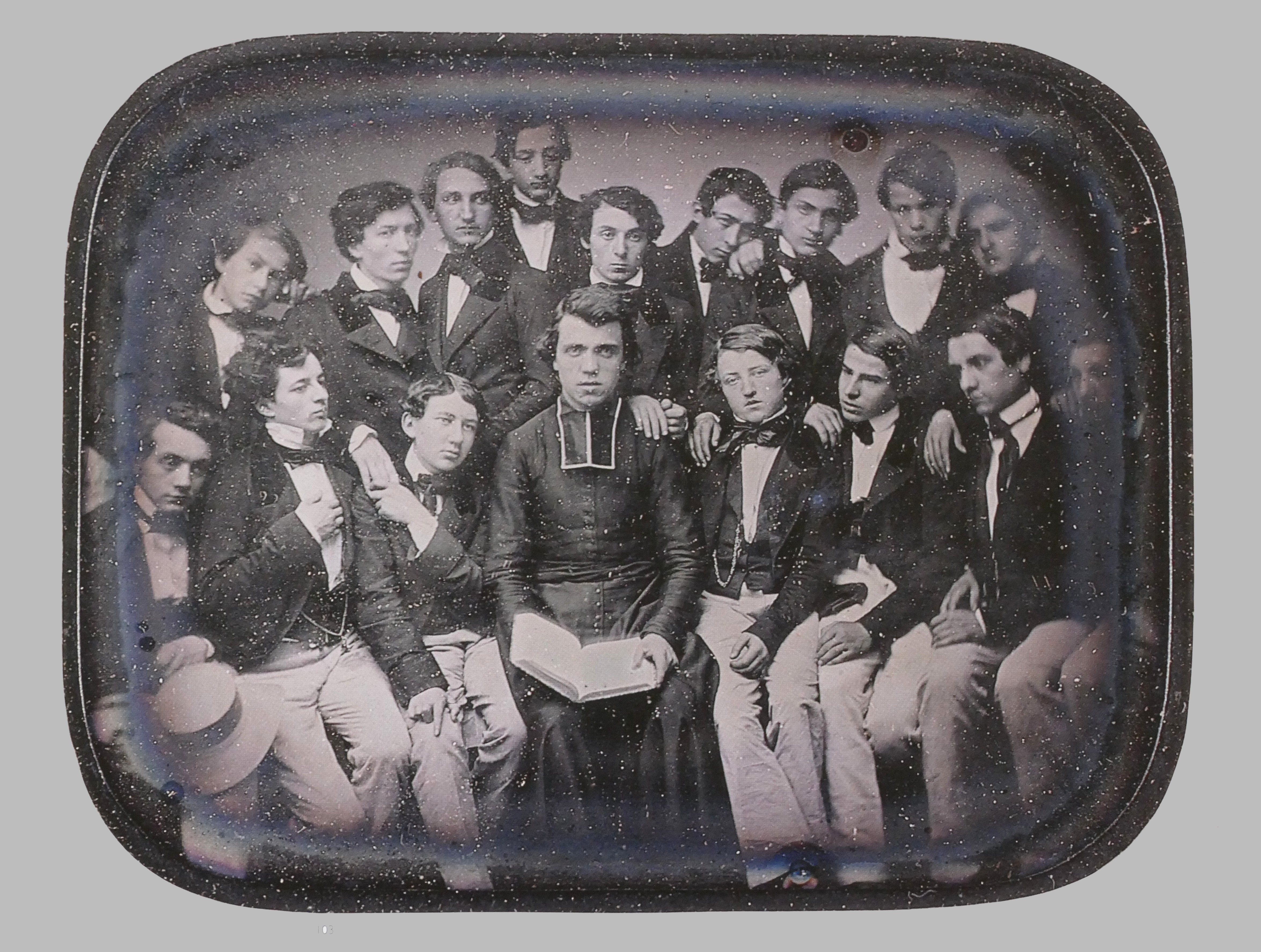 Daguerréotype anonyme vers 1850, un professeur et ses élèves.10 x 14 cm, Saint-Cloud, collection Premières heures.